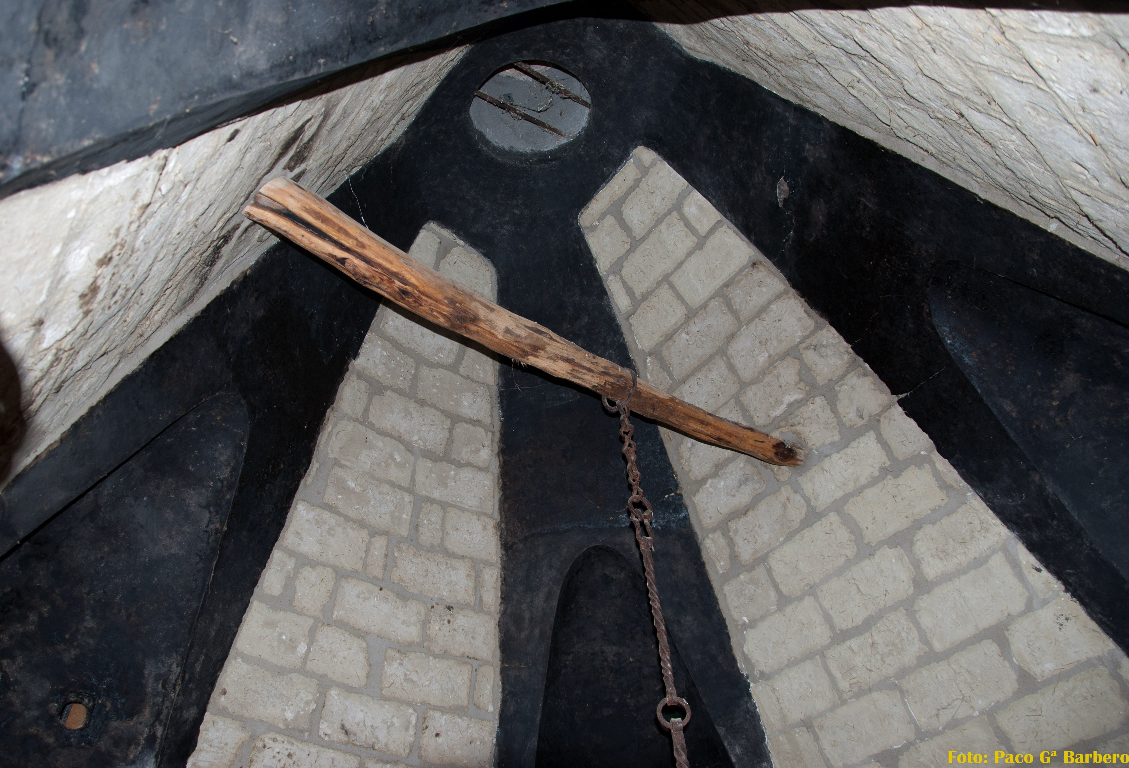 campana de cocina antigua aragonesa de fuego bajo central